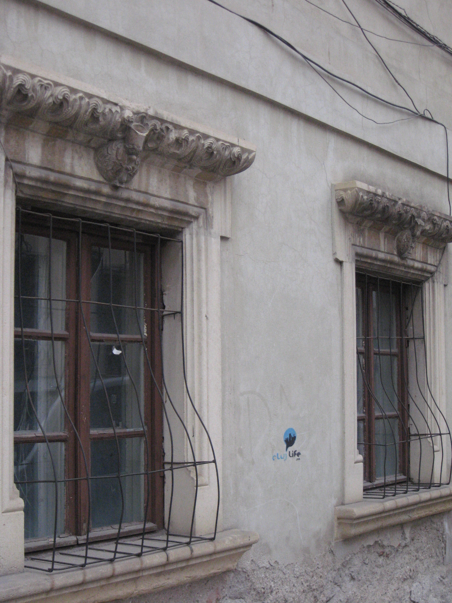 Cluj-Napoca, Casa Argintarului (Casa Breslei Aurarilor), str.I.C.Brătianu nr.26